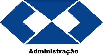 Logotipo da Administração